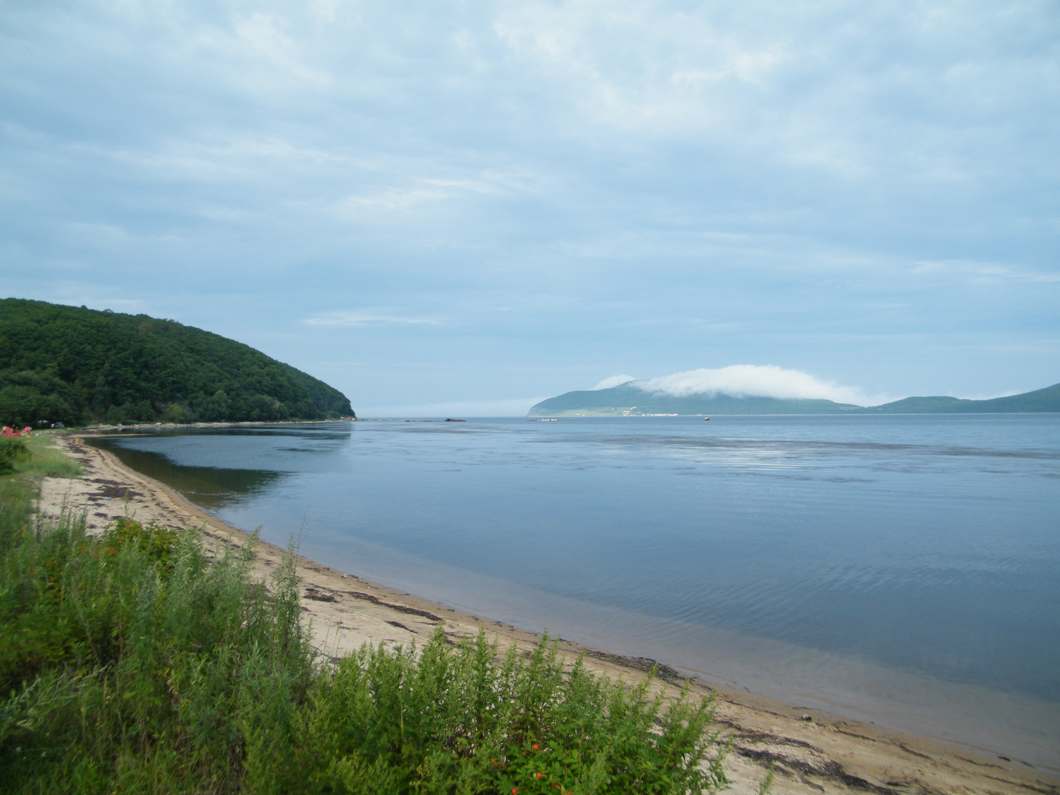 Приморский край, залив Владимира, бухта Южная. Слева - полуостров Рудановского. Справа - полуостров Ватовского и поселок Норд-Ост.